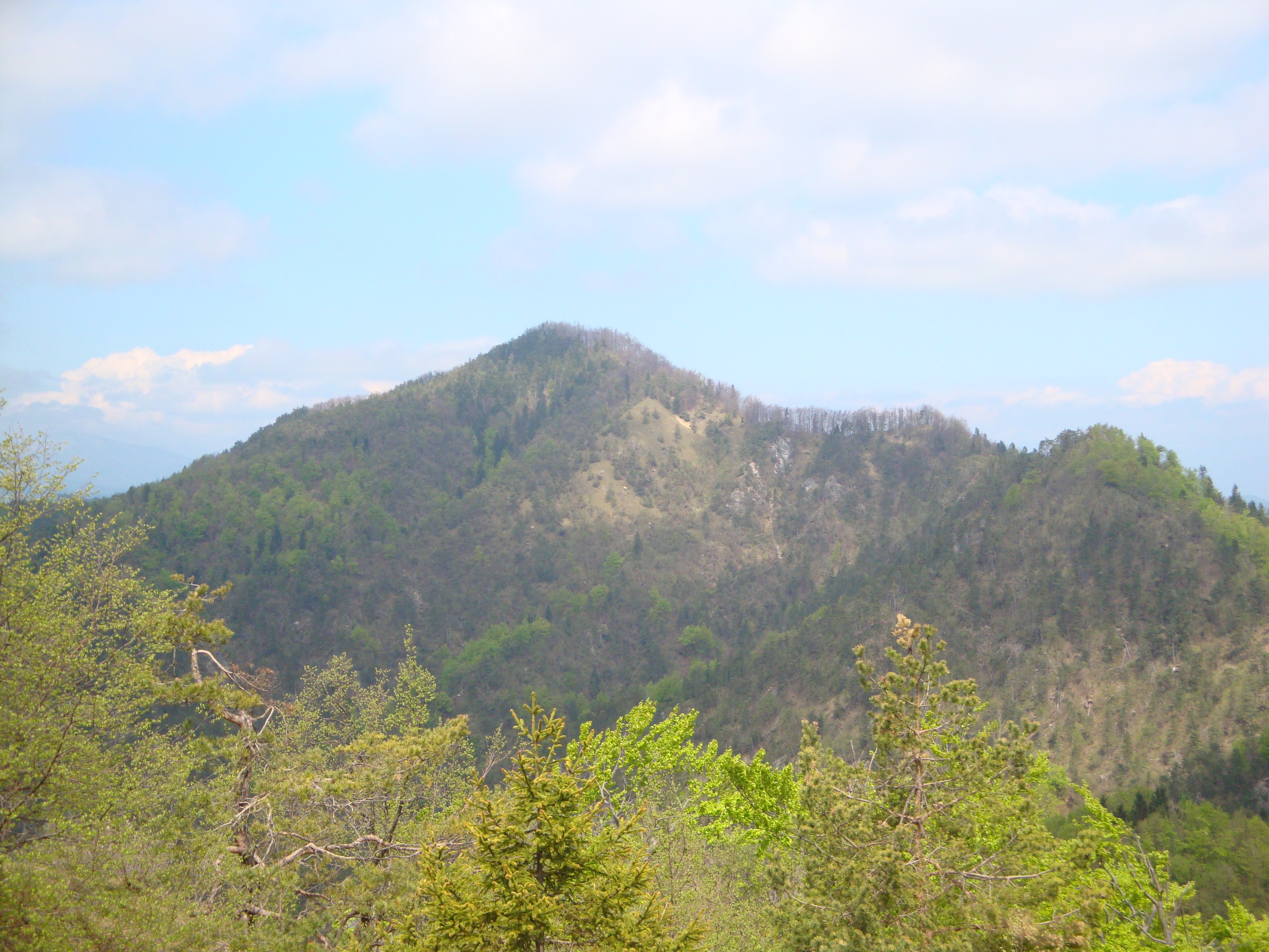 Tošč - pogled z Grmade.